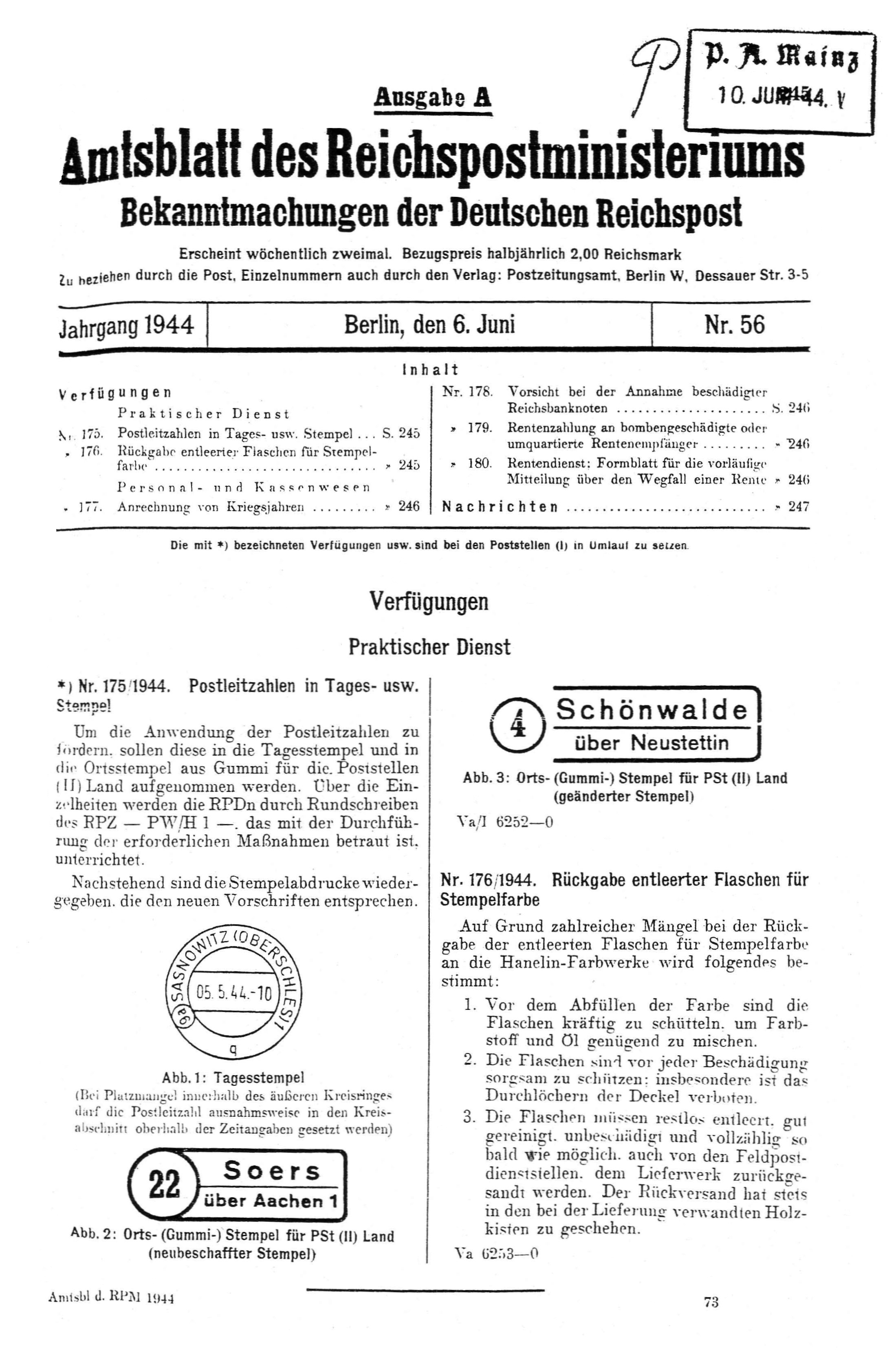 Amtsblatt des Reichspostministeriums / Bekanntmachungen der Deutschen Reichspost